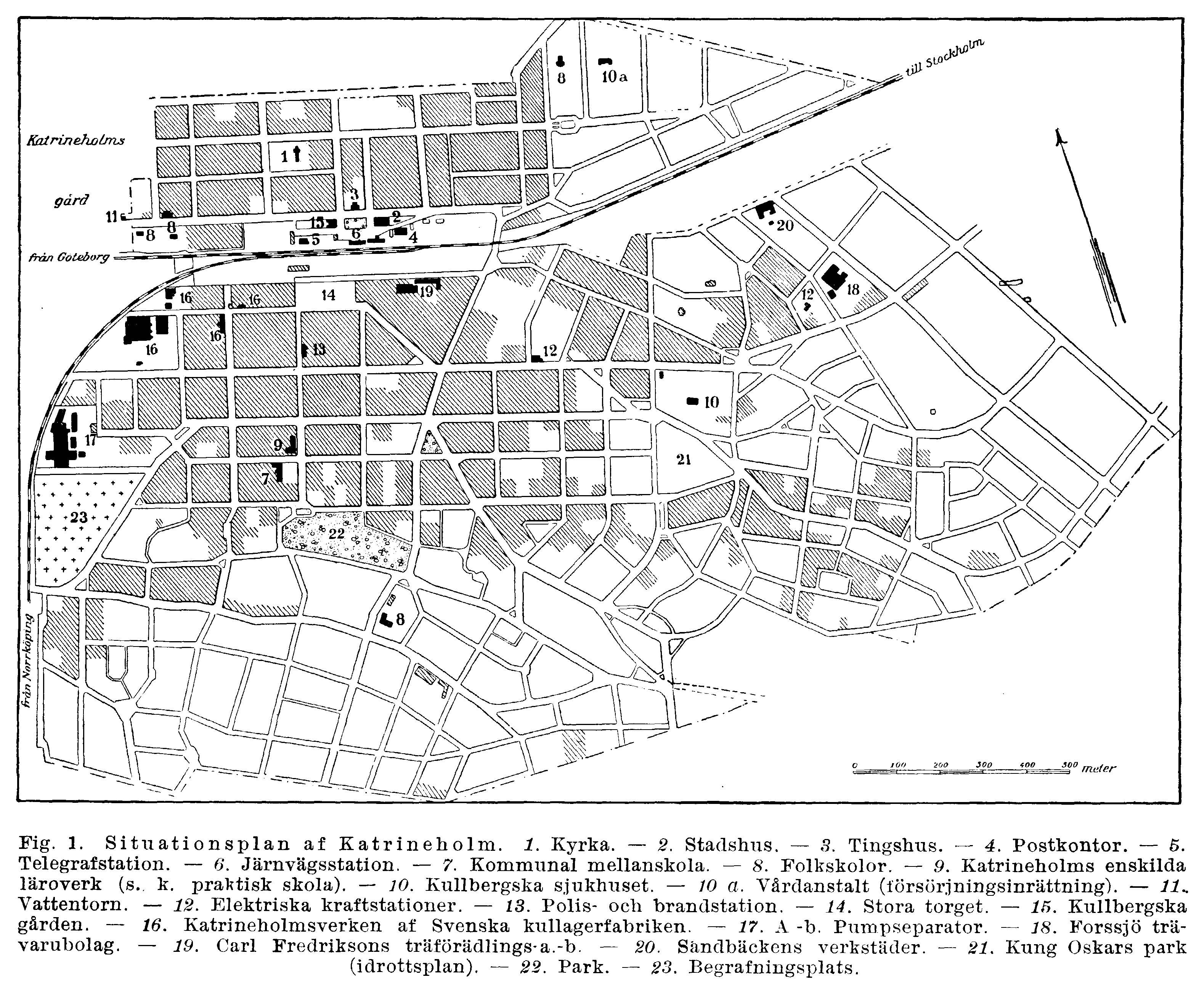 Katrineholm, stadsplan från Nordisk familjebok (1924).